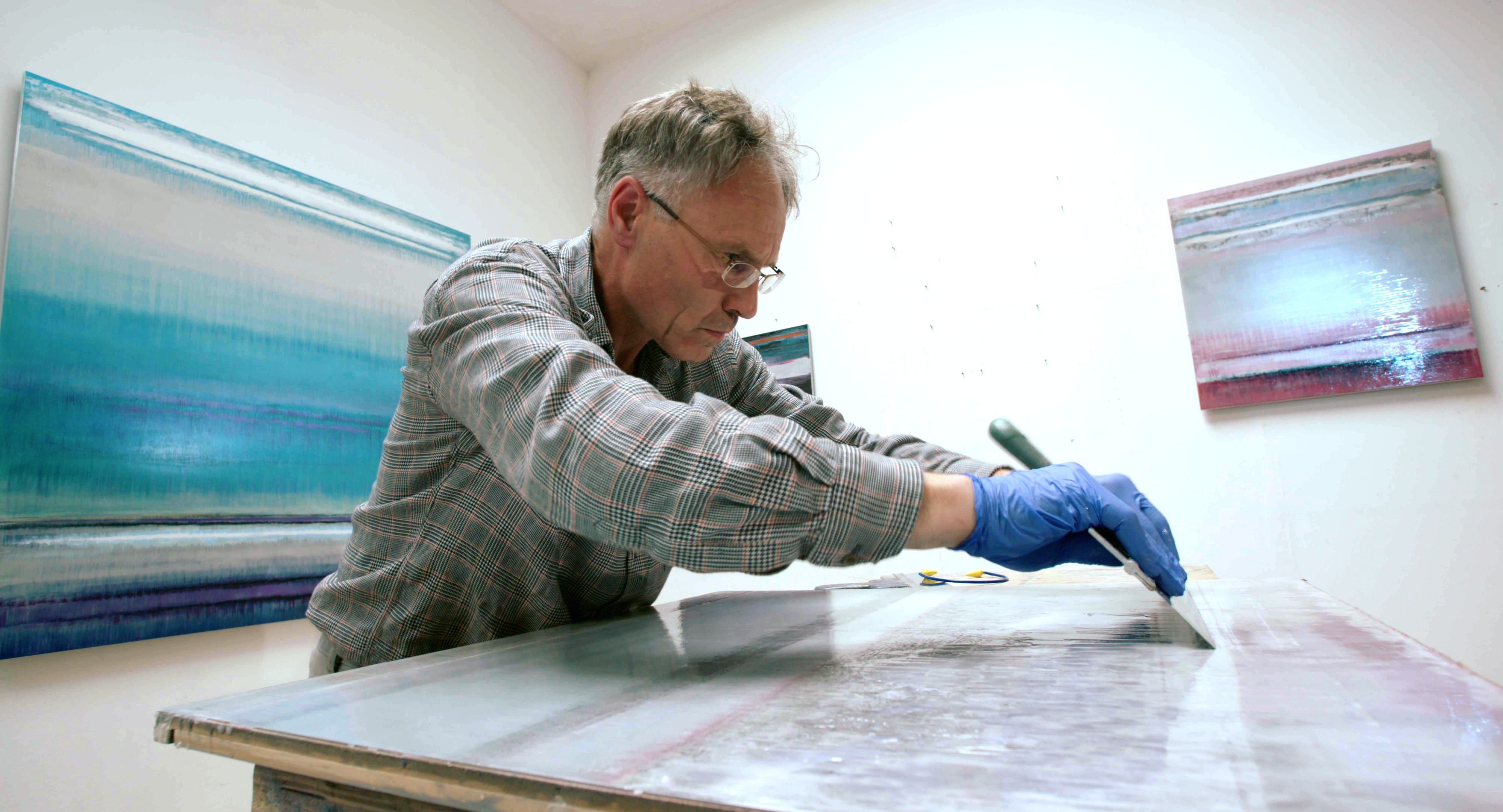 Der Maler Bruno Kurz in seinem Atelier